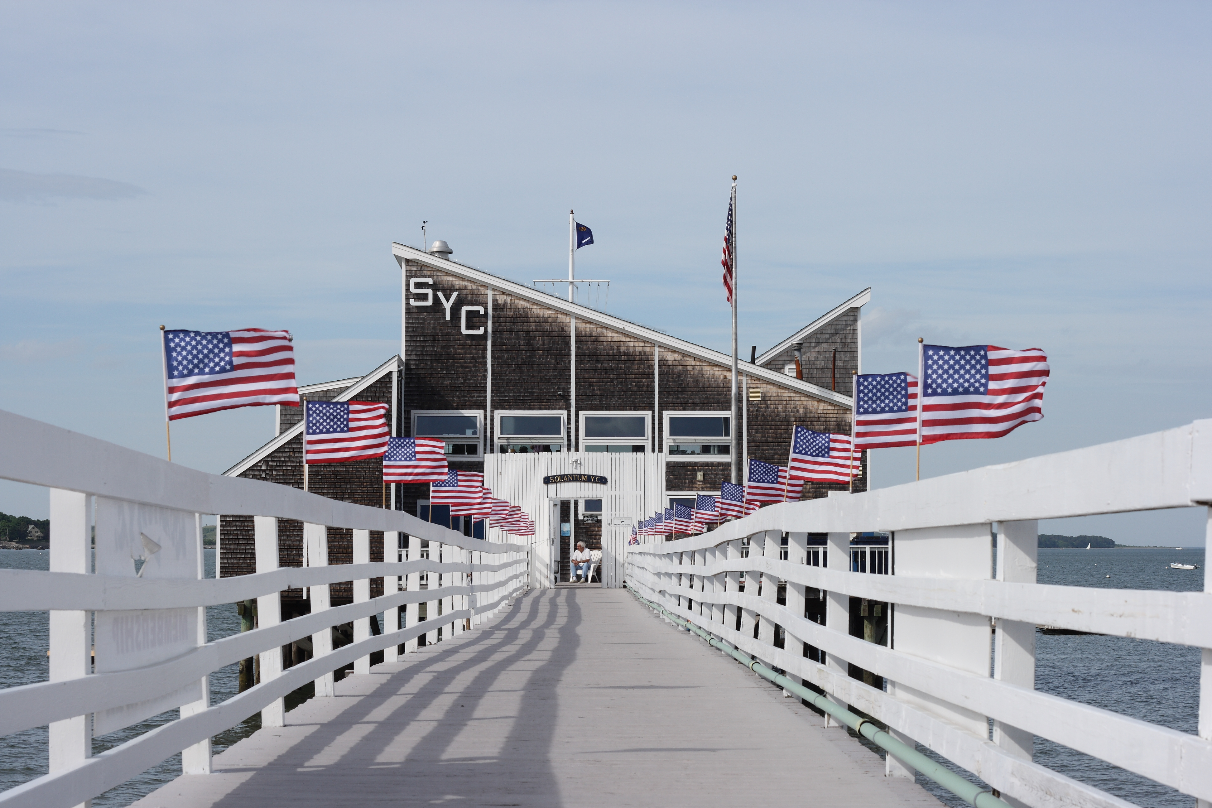 Squantum Yacht Club